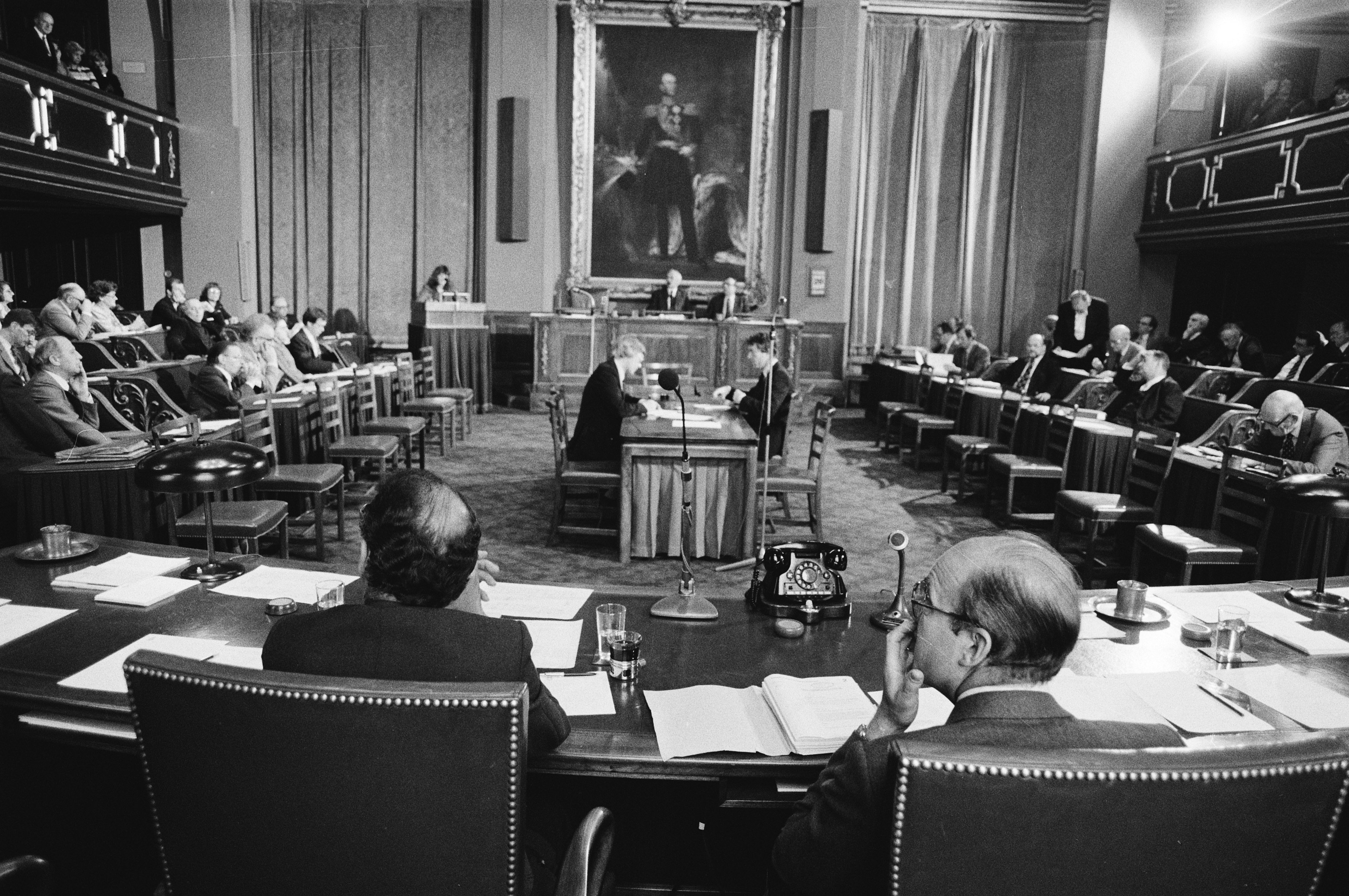 Collectie / Archief : Fotocollectie Anefo Reportage / Serie : [ onbekend ] Beschrijving : Eerste Kamer , behandeling abortus-wetsontwerp, overzicht van de Eerste Kamer tijdens de behandeling Datum : 28 april 1981 Trefwoorden : behandelingen Fotograaf : Antonisse, Marcel / Anefo Auteursrechthebbende : Nationaal Archief Materiaalsoort : Negatief (zwart/wit) Nummer archiefinventaris : bekijk toegang 2.24.01.05 Bestanddeelnummer : 931-4562